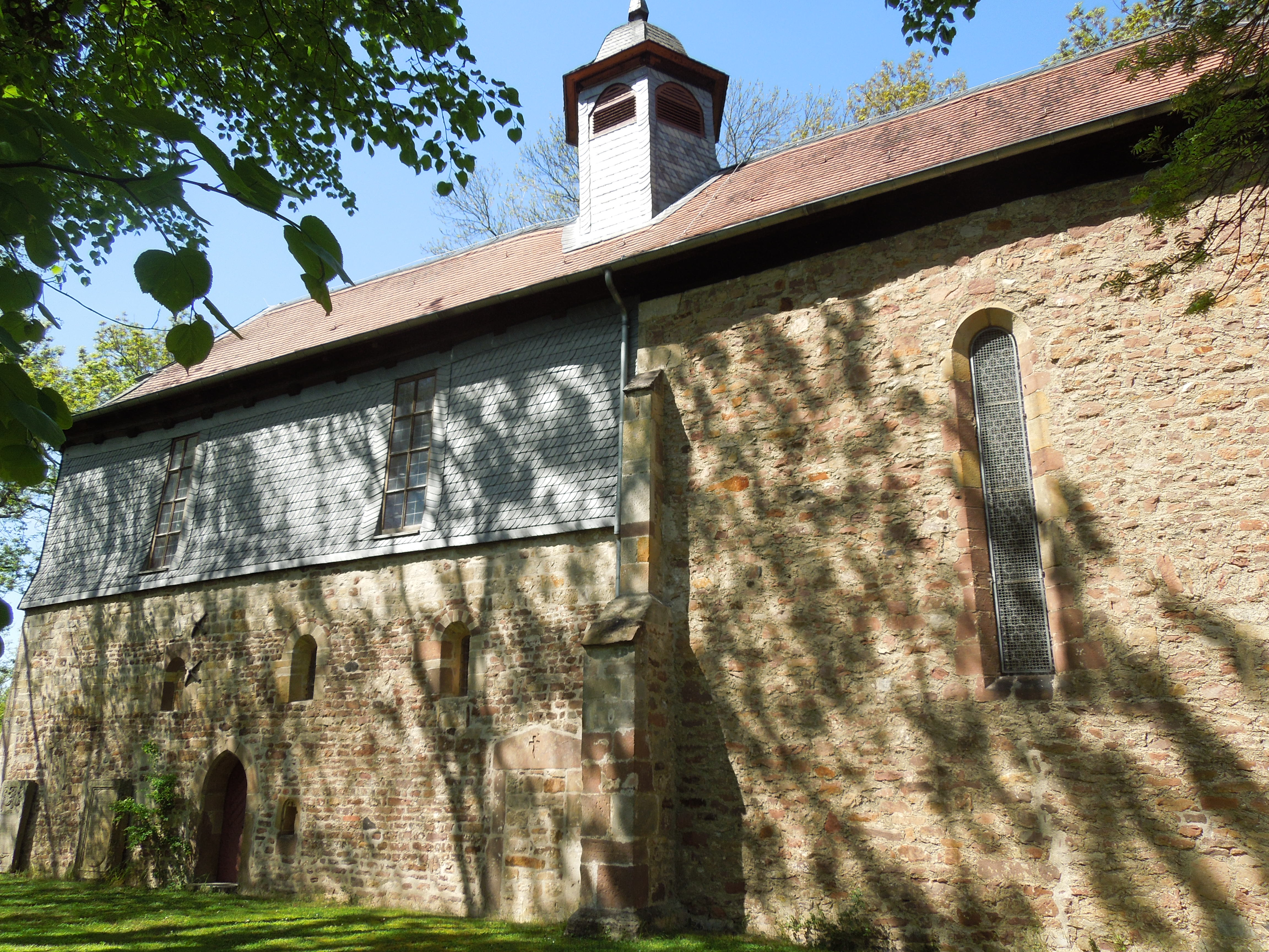 Die Fraumünsterkirche am Ostrand von Fritzlar